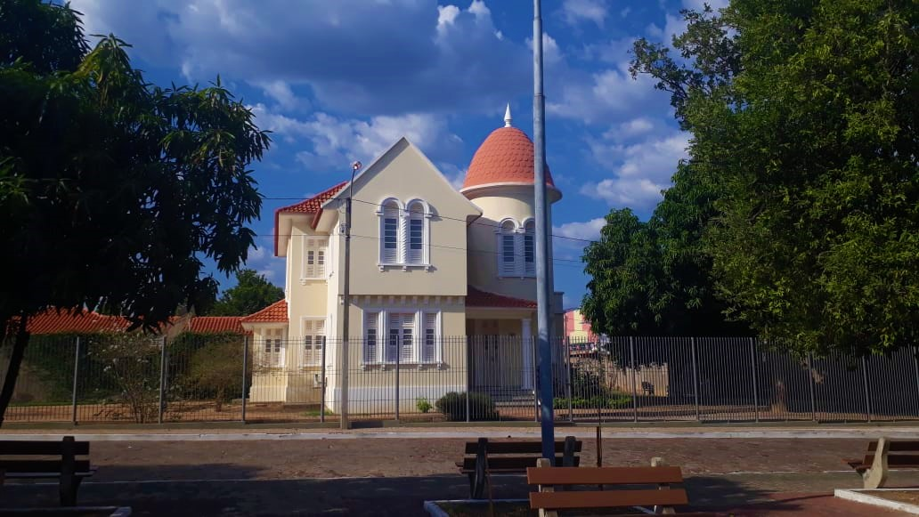 Palacete residencial numa rua de Piracuruca.